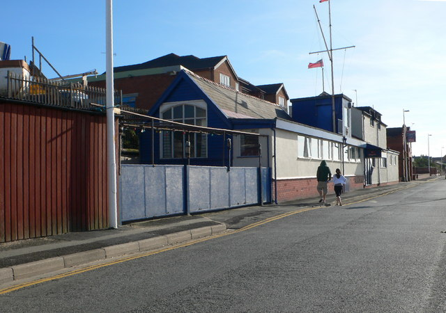 Hoylake Sailing Club